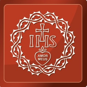 Hermanas de la Caridad del Verbo Encarnado Sisters of the Charity of Incarnate Word